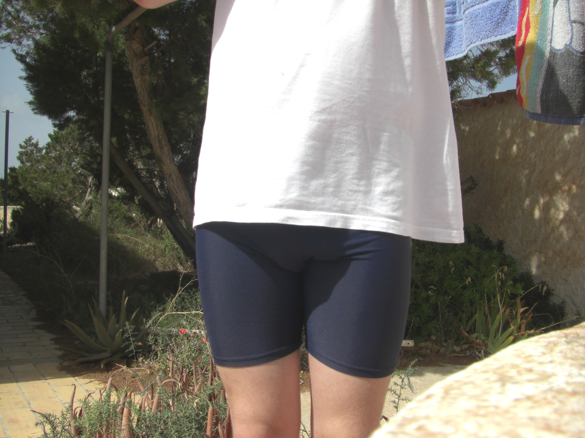 Dunkelblaue Radlerhose